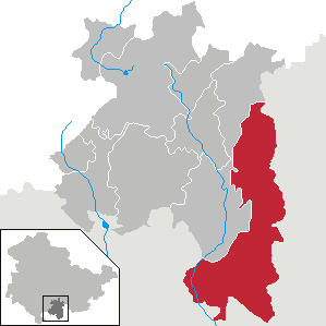 Föritztal im Landkreis Sonneberg, Thürigen